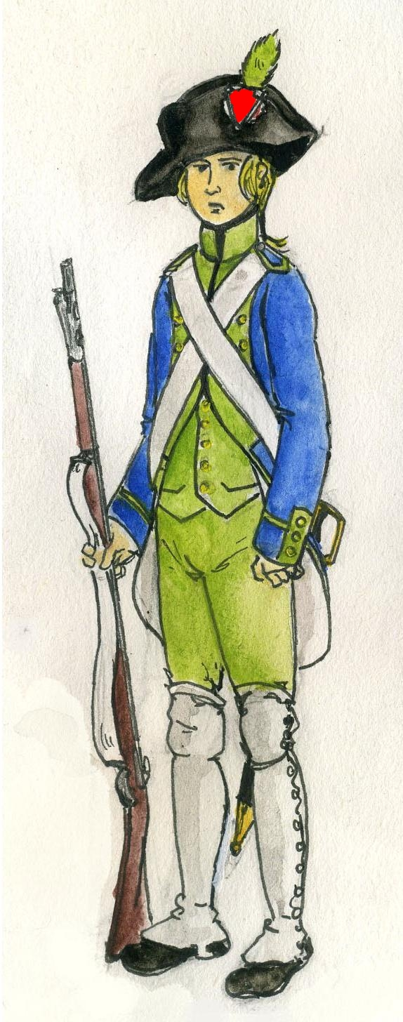 Soldat canonnier extrait du fichier commons Soldats Révolution française.jpg